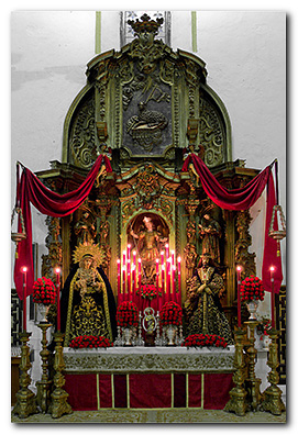 Altar del 275 aniversario